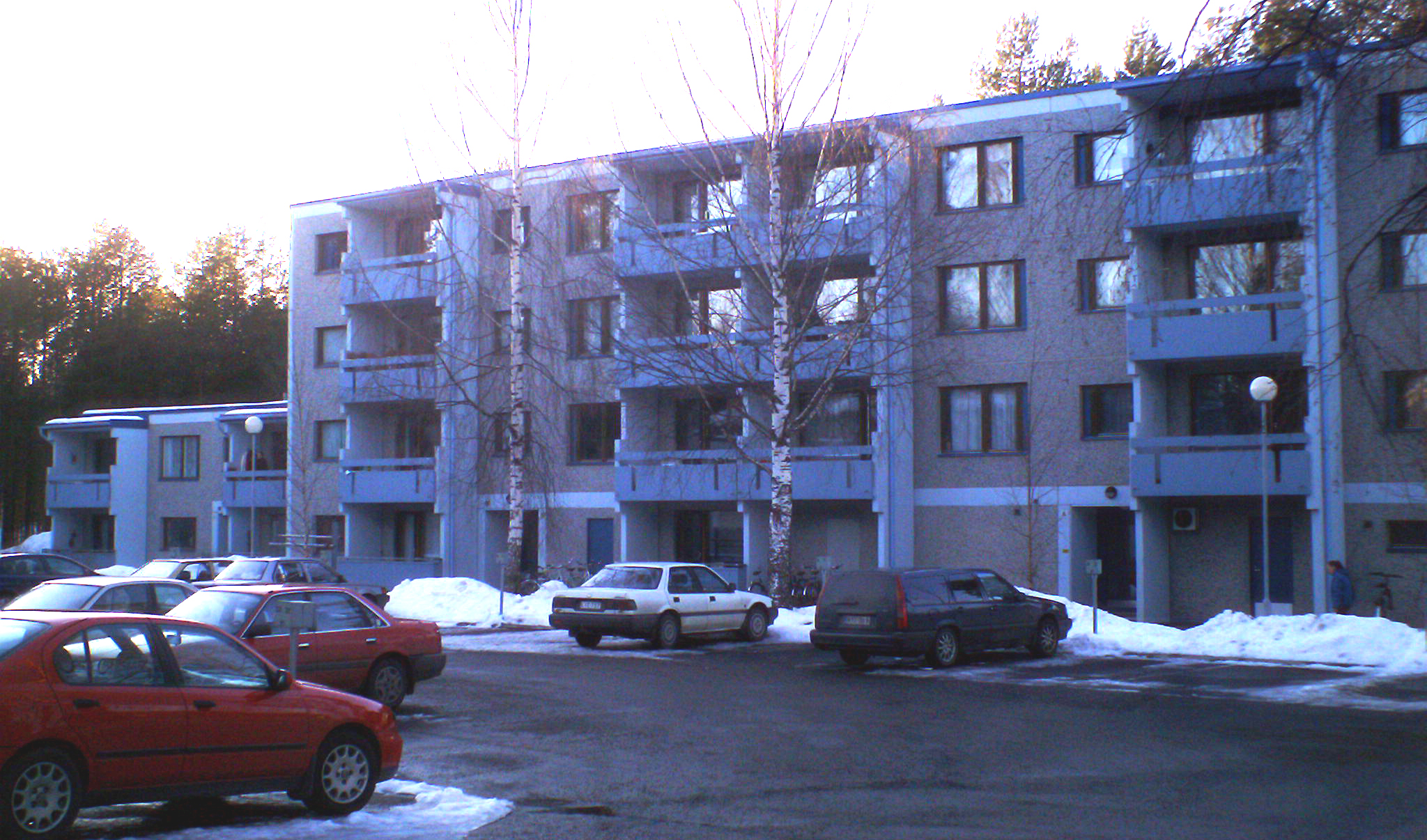 Joensuun Rantakylää